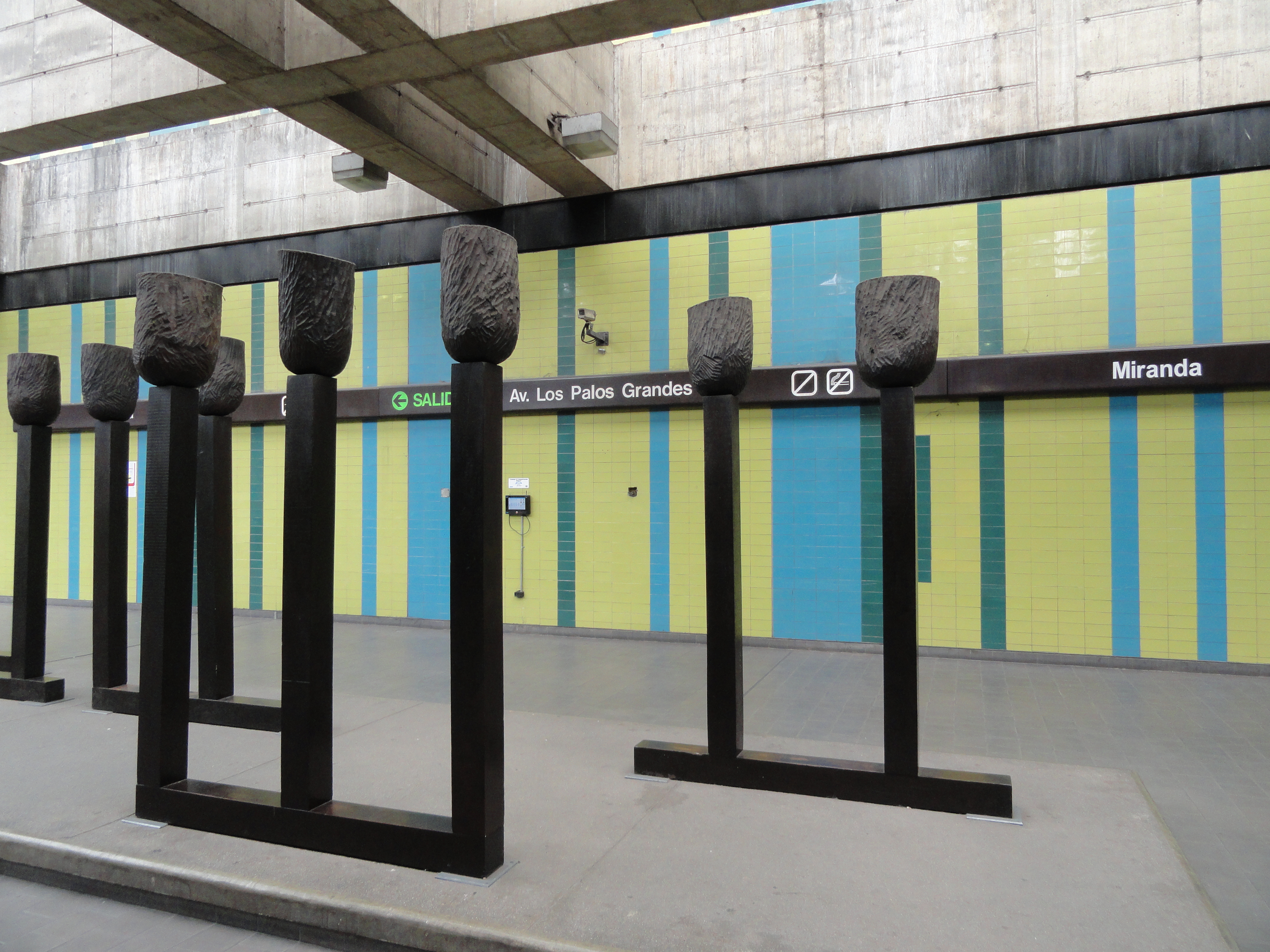 Sistema Metro Del Municipio Chacao